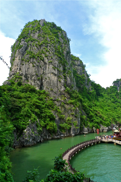 Ha Long Bay - Vietnam